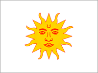 Drapeau de la principauté de Dharampur Contents 1 Source 2 Statut 3 Licensing 4 Original upload log Source Shiva-Nataraja Statut Catégorie:Drapeau de principauté des Indes